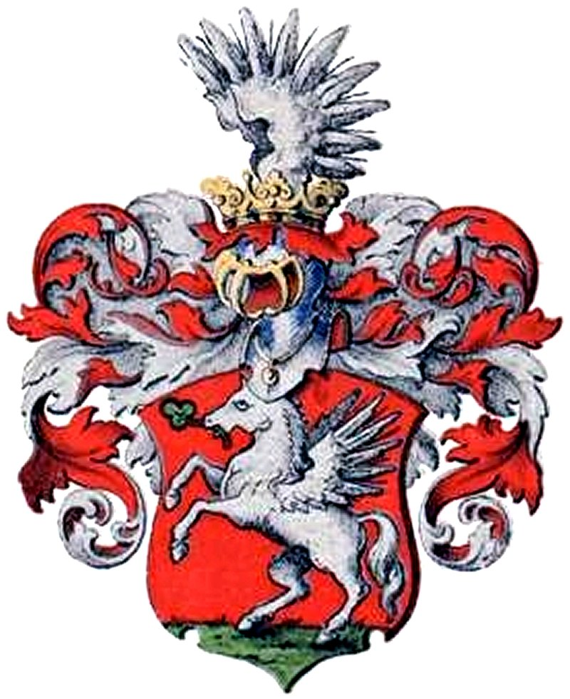 Bruiningki suguvõsa (Veselauska) aadlivapp